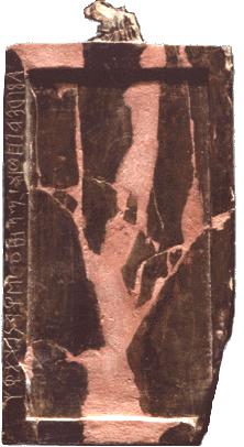 Tablette de Marsiliana d'Albegna -Grosseto -Italie. Avec abécédaire de l'alphabet étrusque. VIIe siècle av. J.-C. Musée archéologique national de Florence.